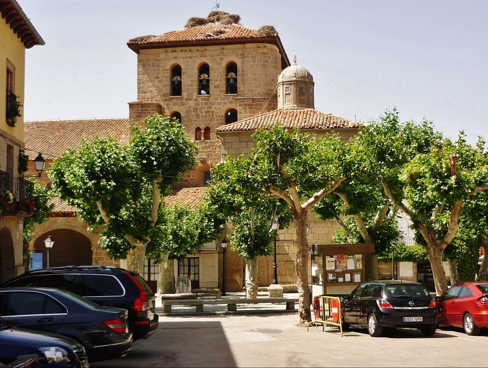 Iglesia de Nuestra Señora de la Asunción, Piedrahíta, Ávila. Fotos de Alejandro Blanco